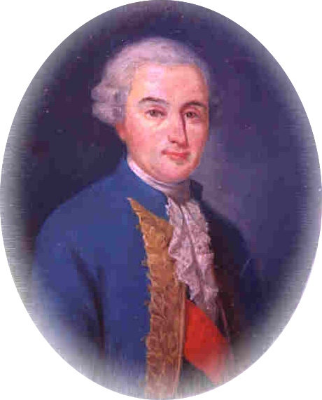 Charles Jean d'Hector (1722-1808), lieutenant général des armées navales. Portrait à l'huile peint sur un médaillon en bois de 15,50 x 12cm